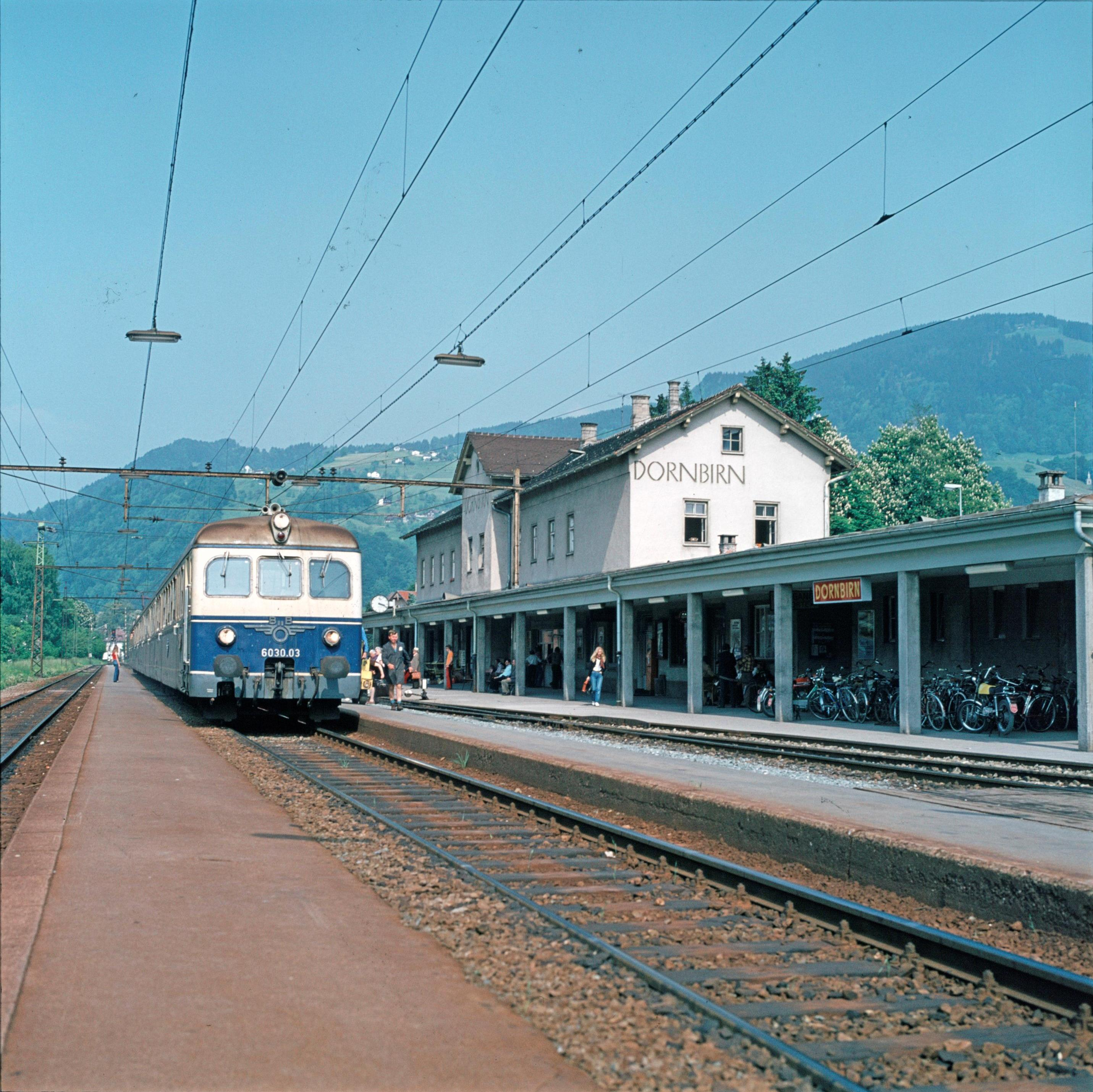 Blick auf den Bahnhof Dornbirn mit zentralem Aufnahmsgebäude und Hausbahnsteig links.